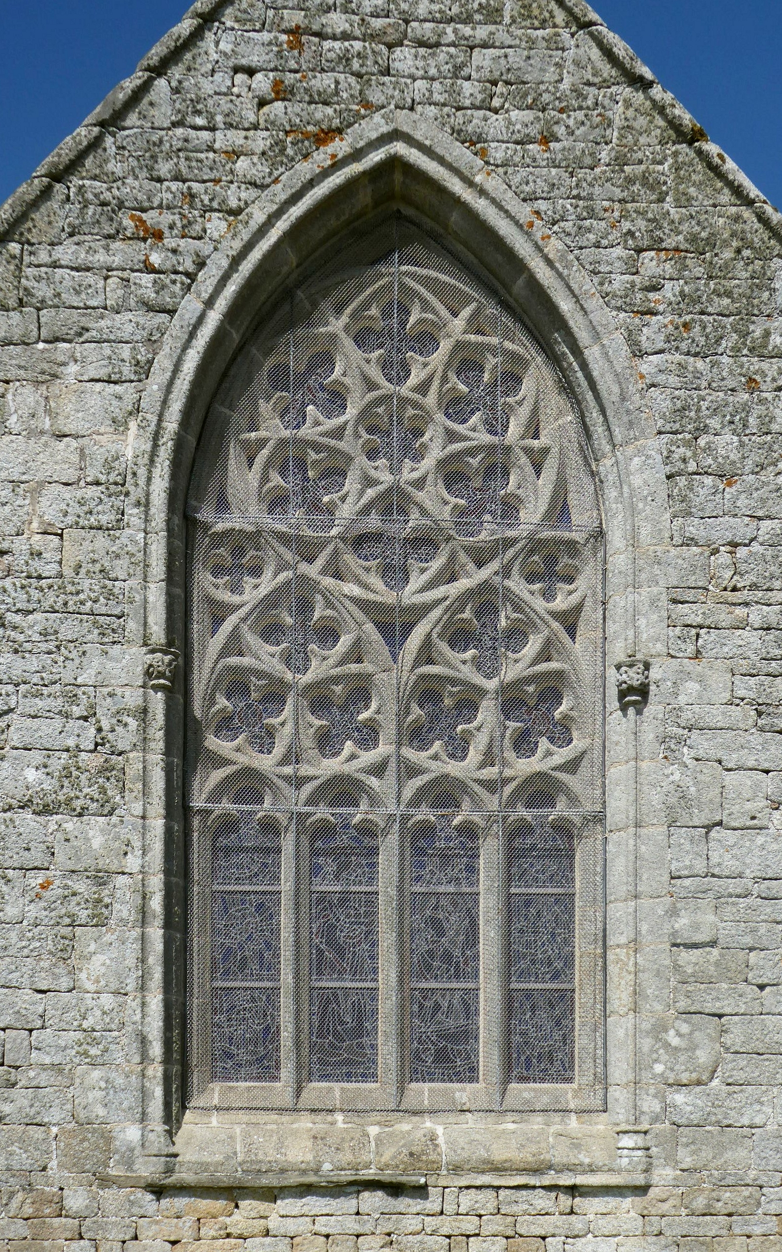 Chapelle Saint-Budoc de Beuzec-Cap-Caval